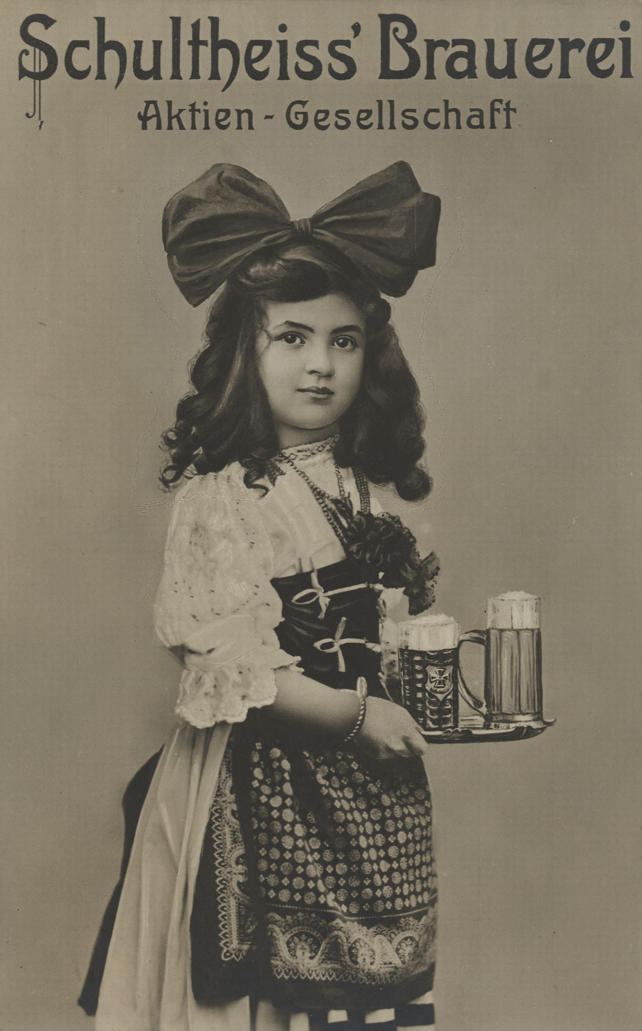 Postkarte der Schultheiss-Brauerei, Berlin